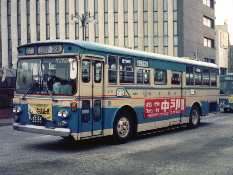 Hakone Tozan B530 Isuzu BU10D from Kanachu at Odawara Sta.